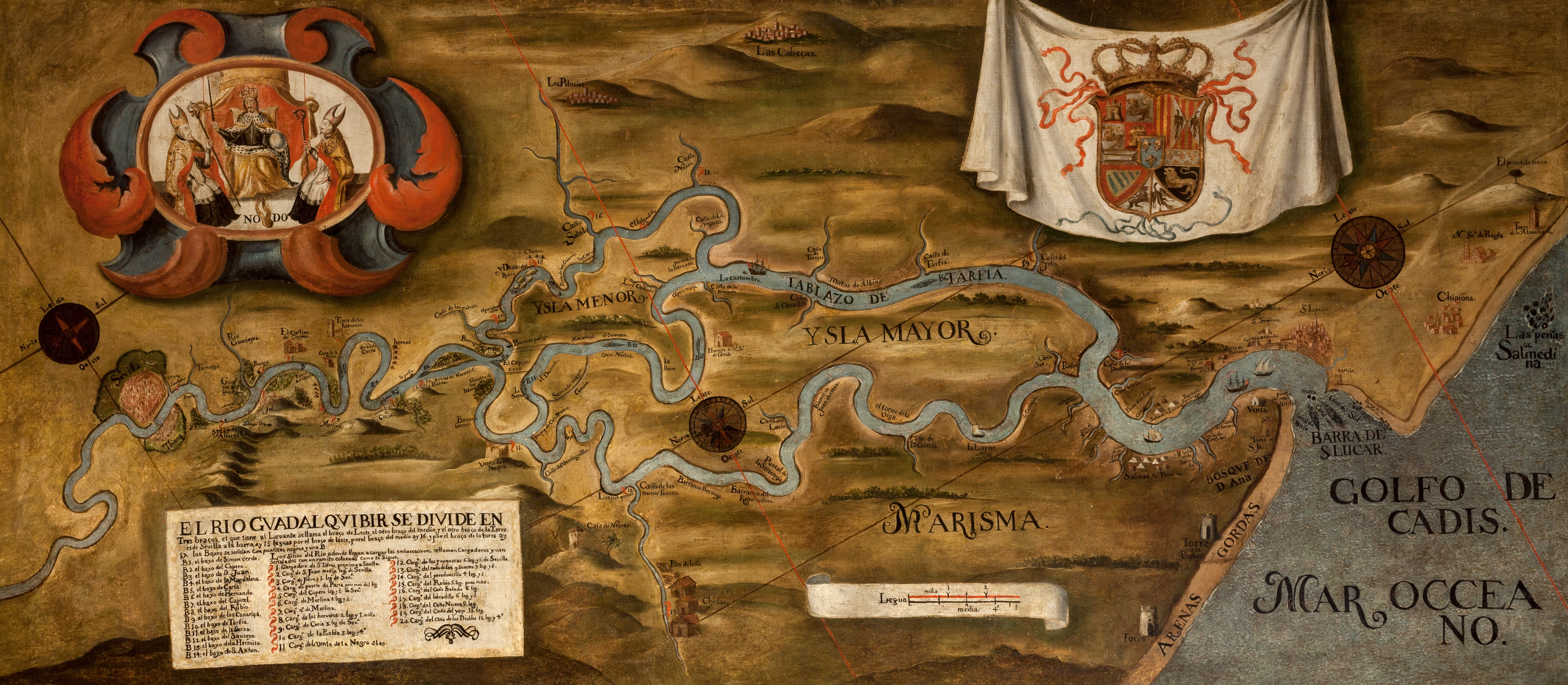 La obra representa el curso del río Guadalquivir en el año 1760, y en el lienzo también aparecen el pendón del rey Carlos III de España, que subió al trono en 1759, y un escudo de la ciudad de Sevilla en el que figura la imagen del rey San Fernando, que fue canonizado en 1671.